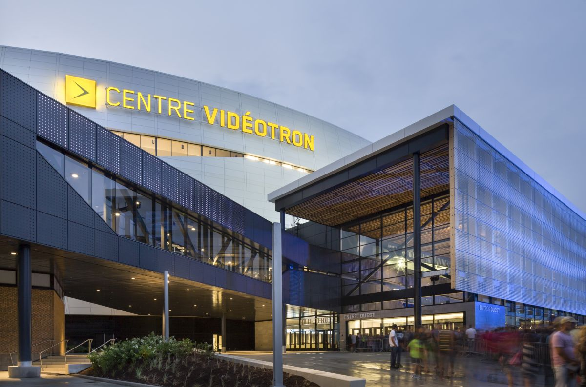 Le Centre Vidéotron - août 2015